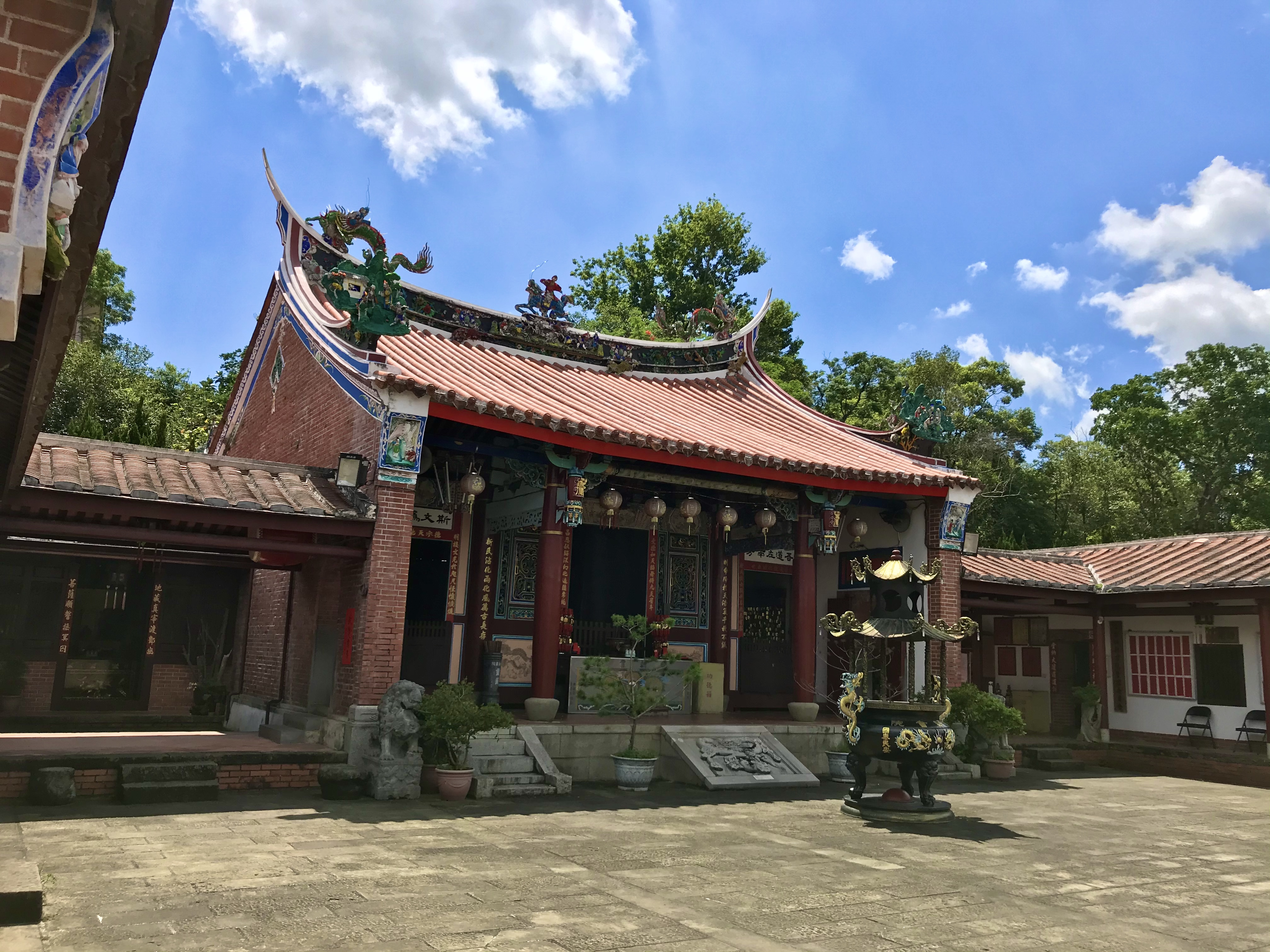 中文（台灣）: 明新書院斜照